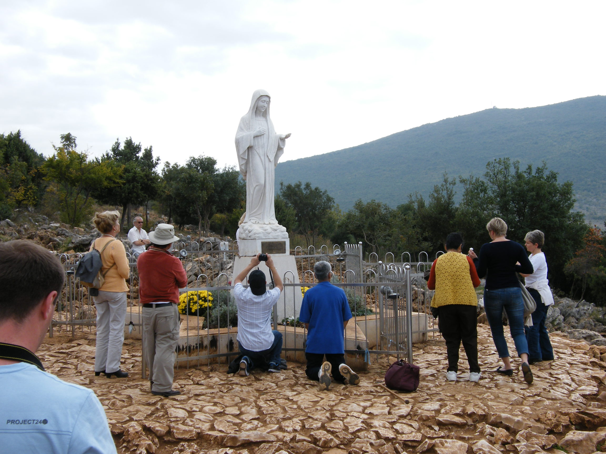 Wzgórze Objawień w Medjugorje.